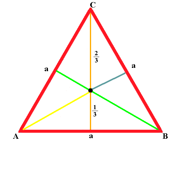 t part